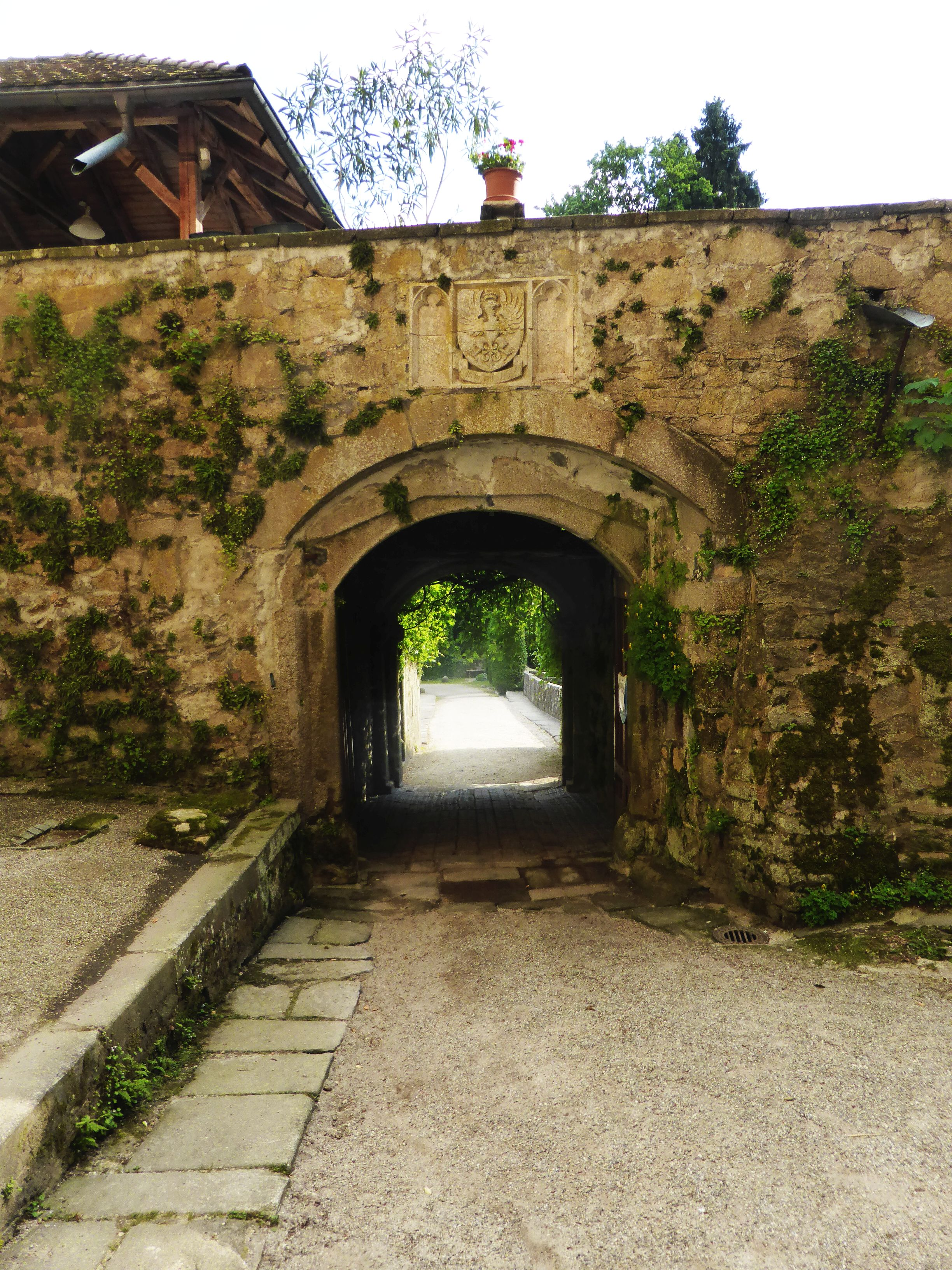 Schloss Egg